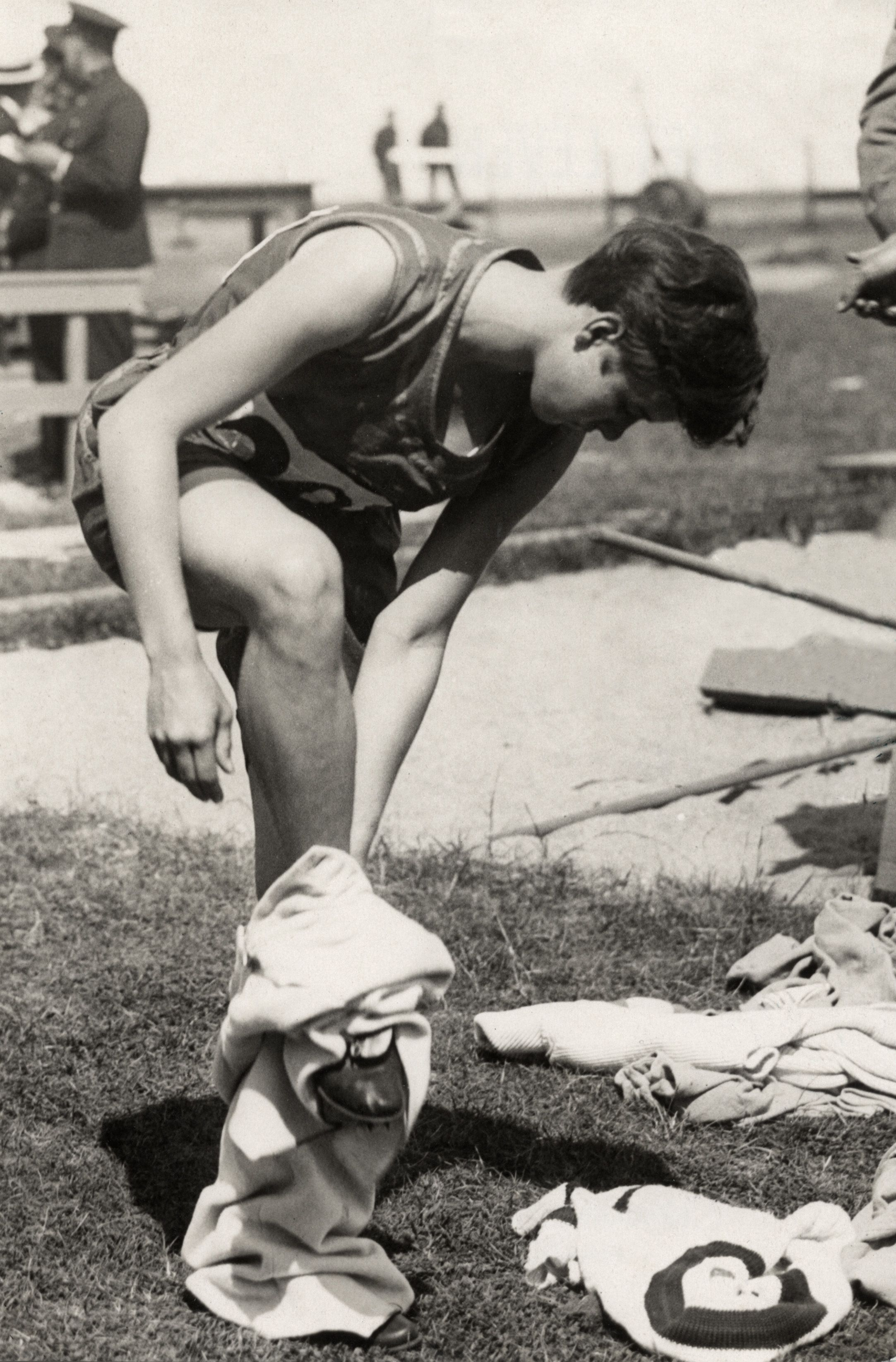 De Zuid-Afrikaanse atlete Marjorie Clark maakt zich gereed voor de series 100 meter sprint voor dames, tijdens de Olympische Spelen 1928 in Amsterdam.